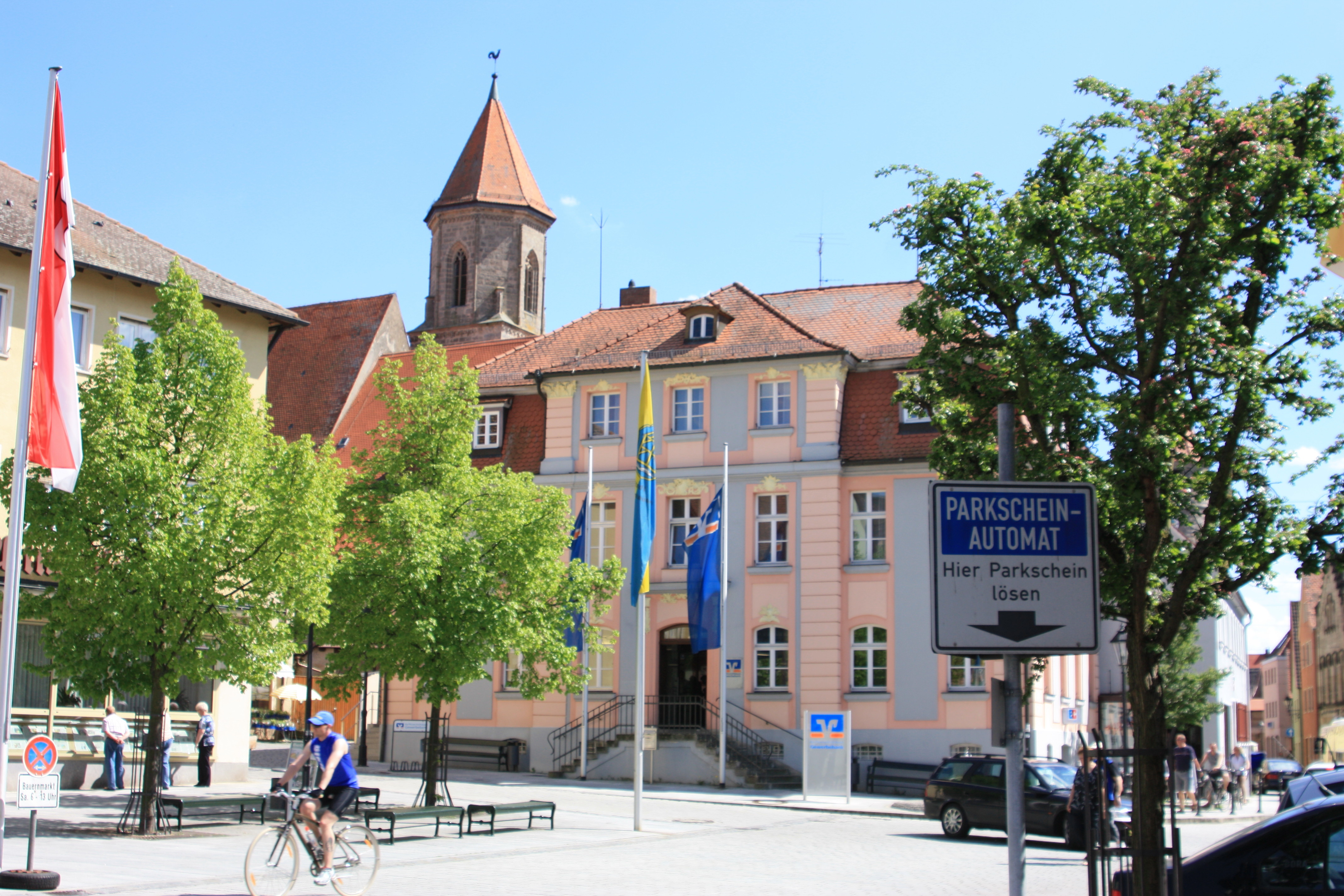 Gunzenhausen Ehem. Palais Heydenab, ab 1748